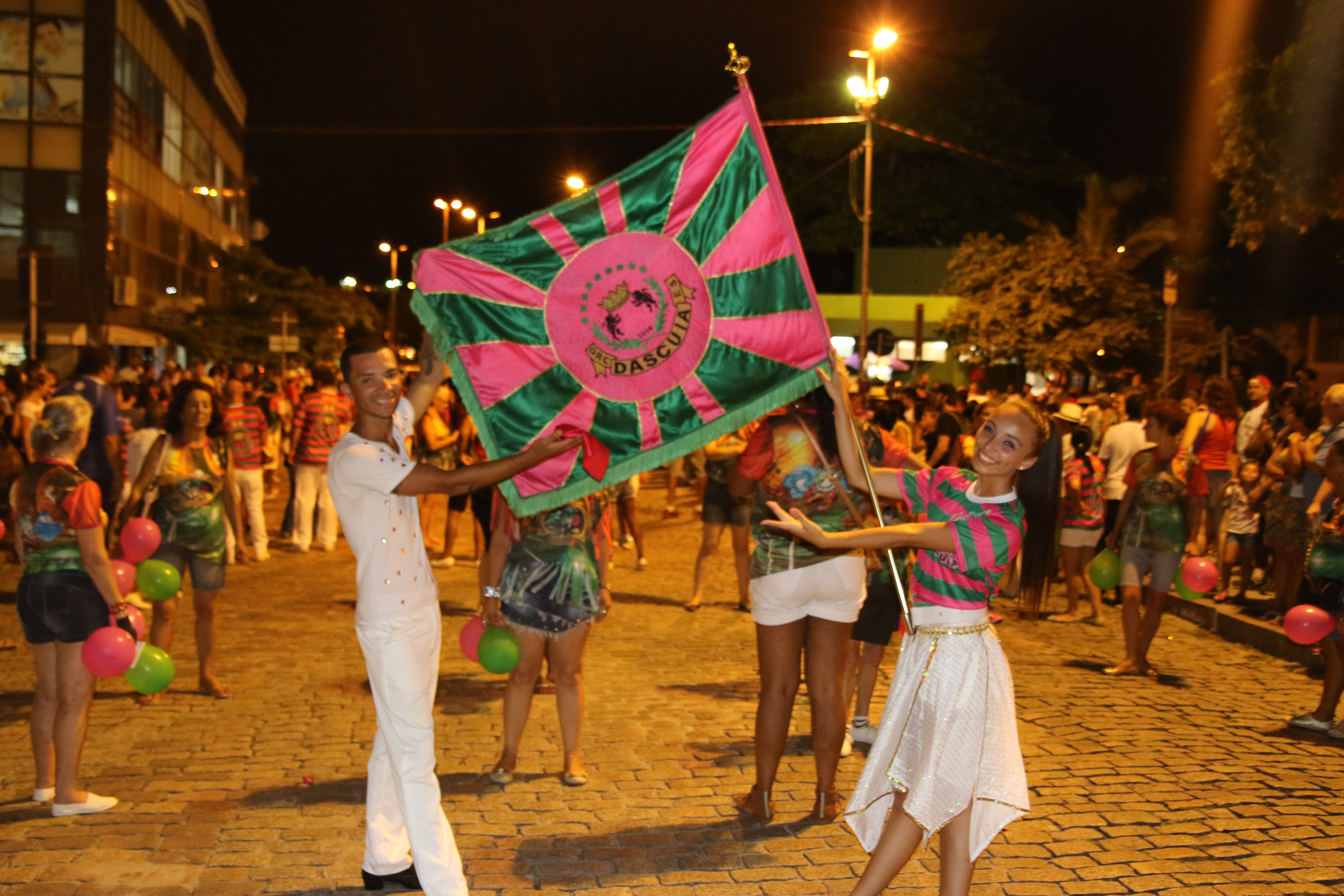 G.R.C.E.S. Dascuia fazendo o Ensaio "Volta a Praça XV" em 2015.